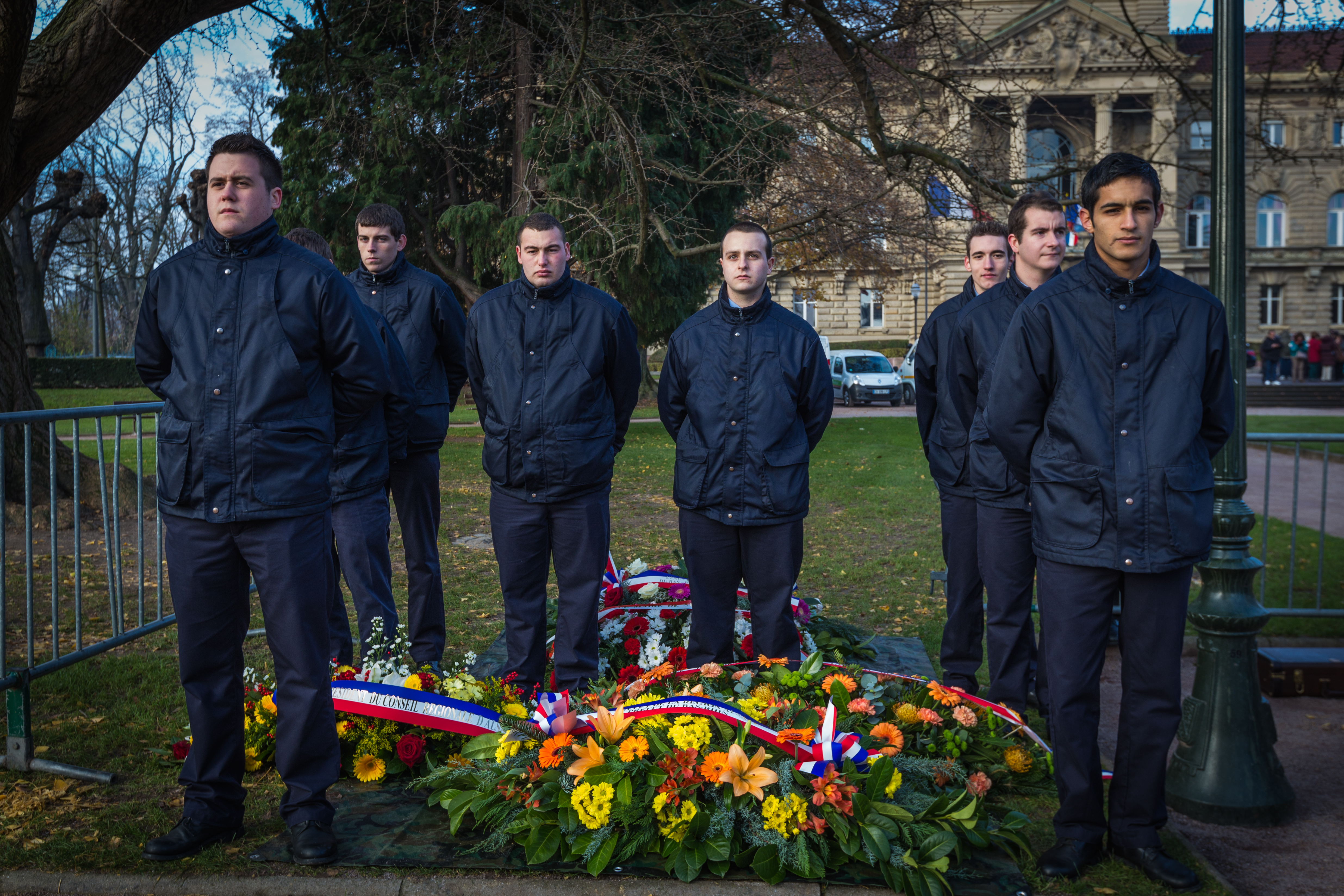 Jeunes volontaires de l’Établissement public d'insertion de la Défense lors de l’hommage aux « Morts pour la France » Strasbourg, 5 décembre 2013